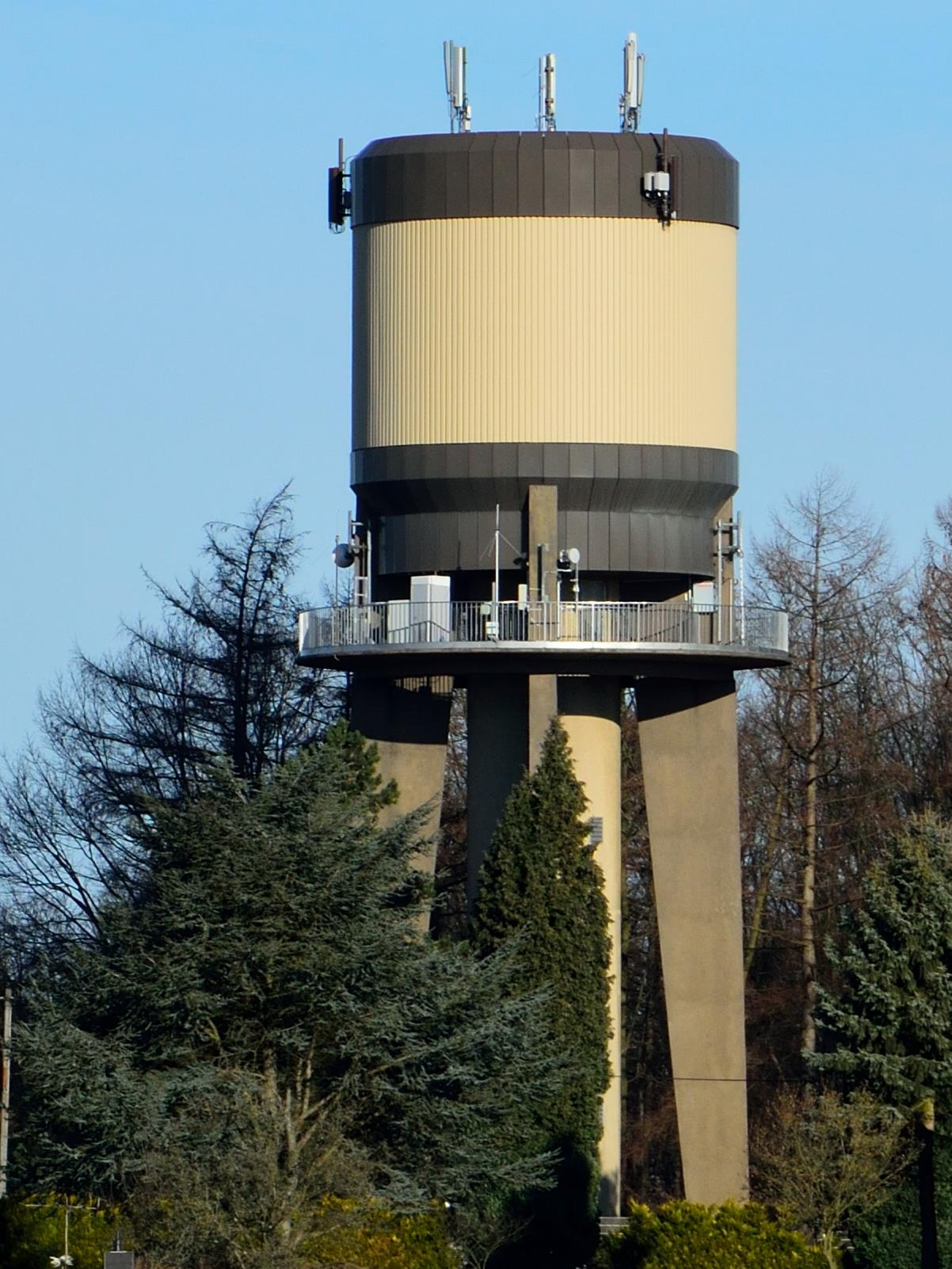 Wasserturm Kermelberg in Witten-Schnee